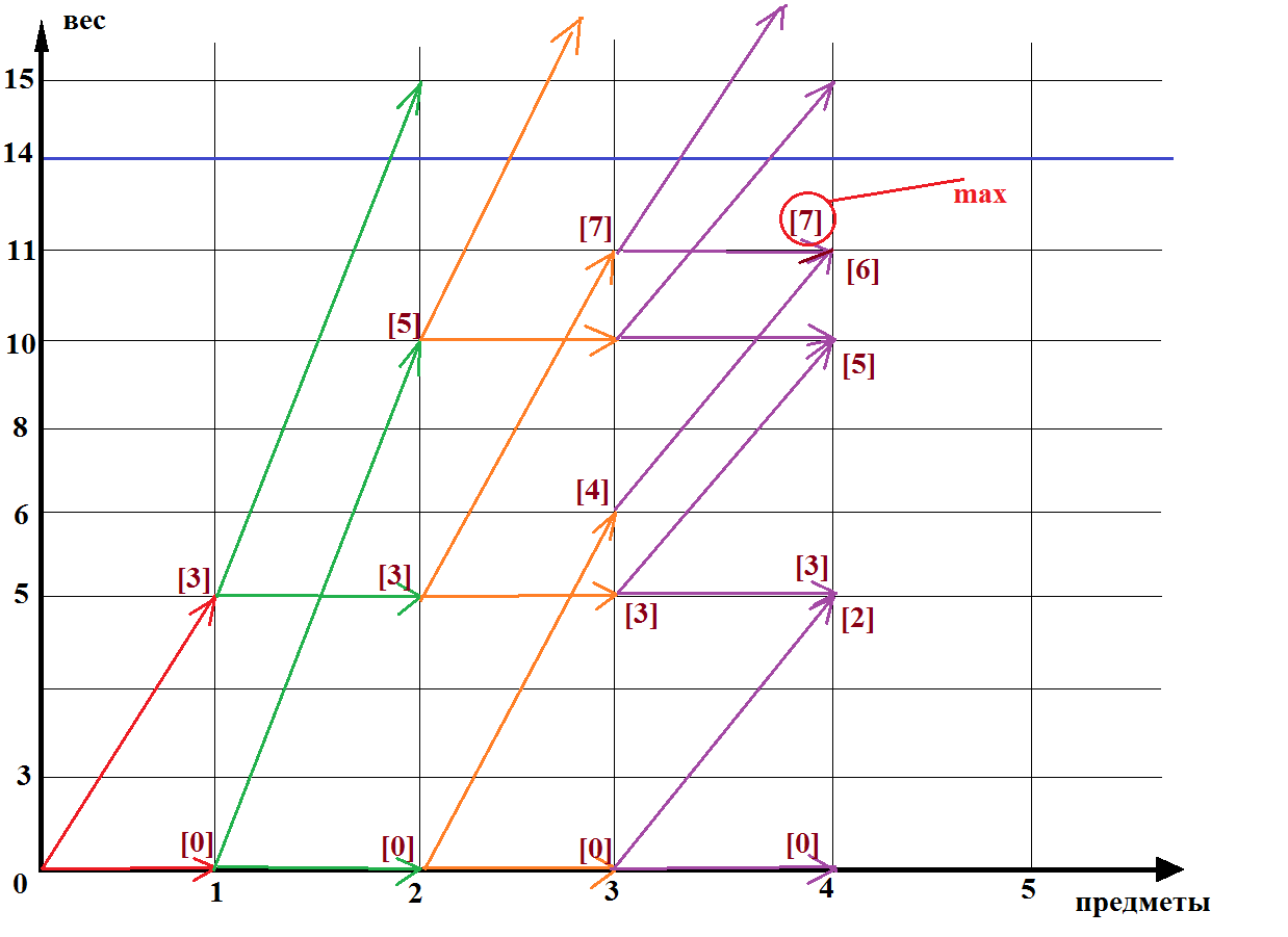 для задачи о рюкзаке